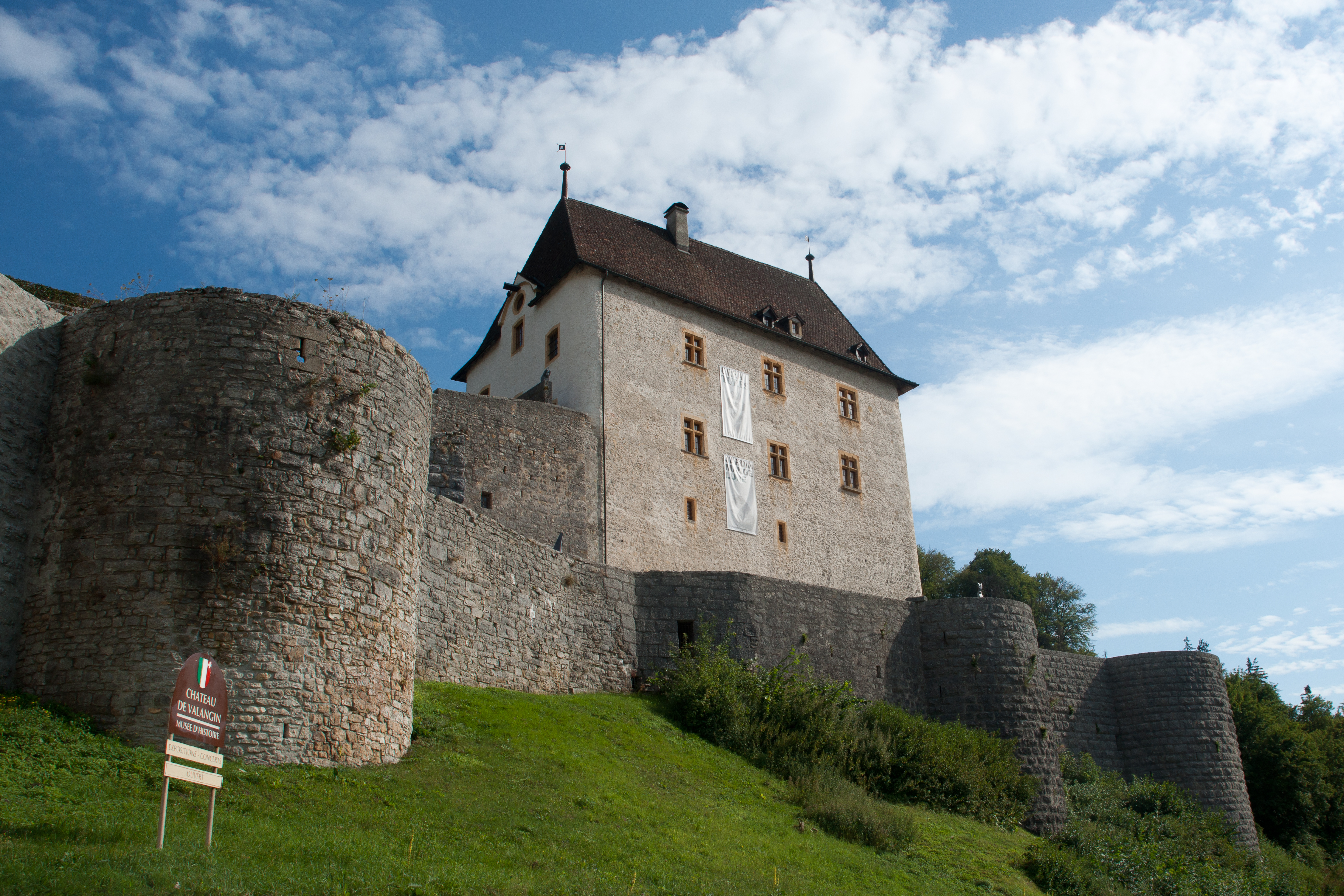 Château de Valangin